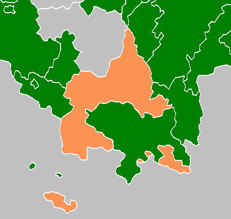 Saksen-Hildburghausen (oranje) in 1820 - andere Thüringse staten groen, overige landen grijs